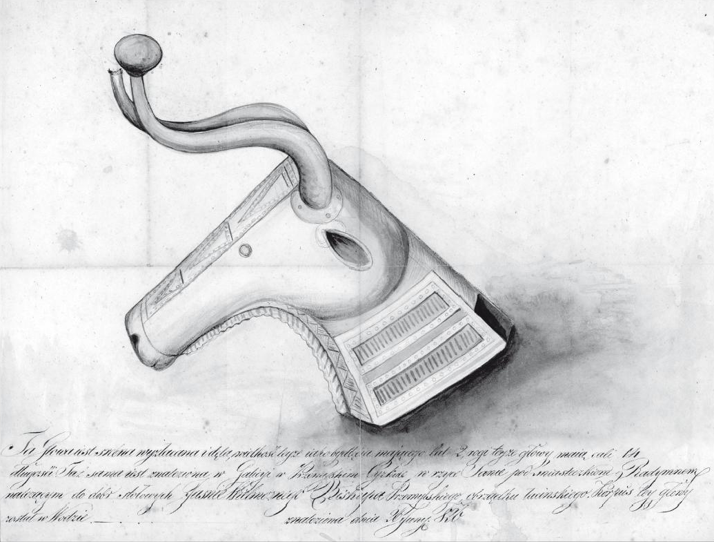 Srebrna głowa byka znaleziona w Sanie pod miasteczkiem Radymno 26 czerwca 1826 roku (K. Hadeczek 1909)